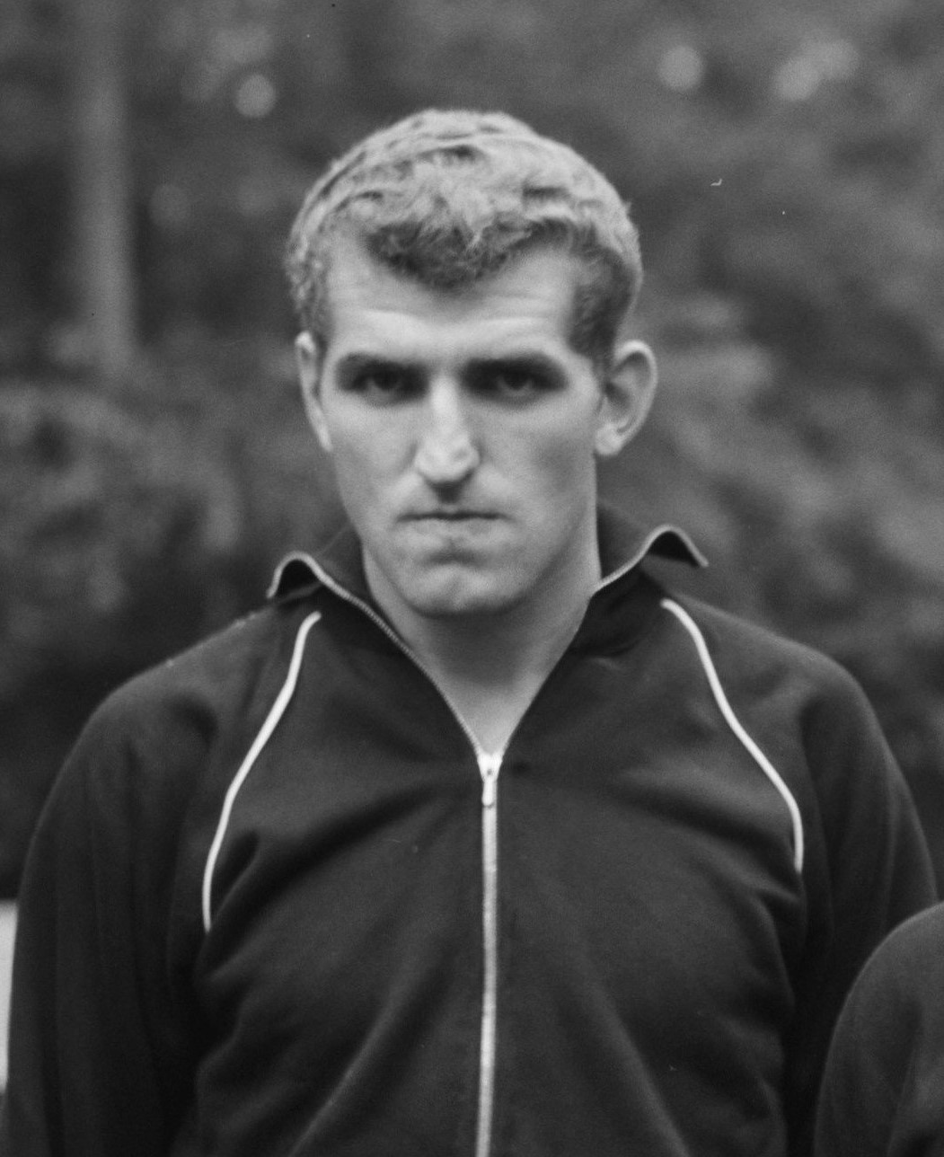 Henk Bosveld in 1962.